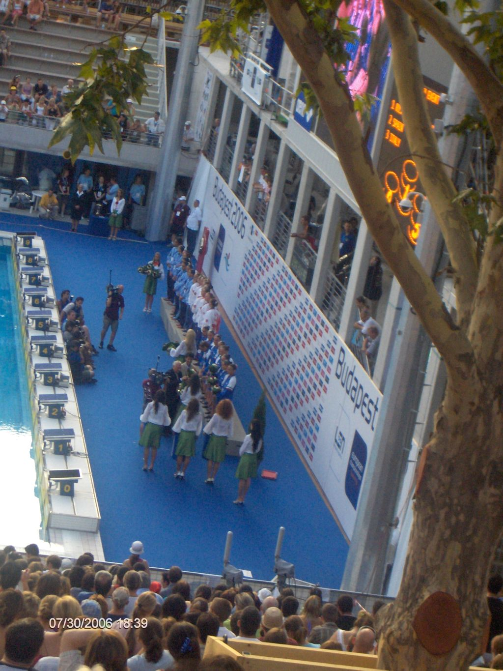 Úszó EB – Szinkronúszás eredményhirdetése – Budapest